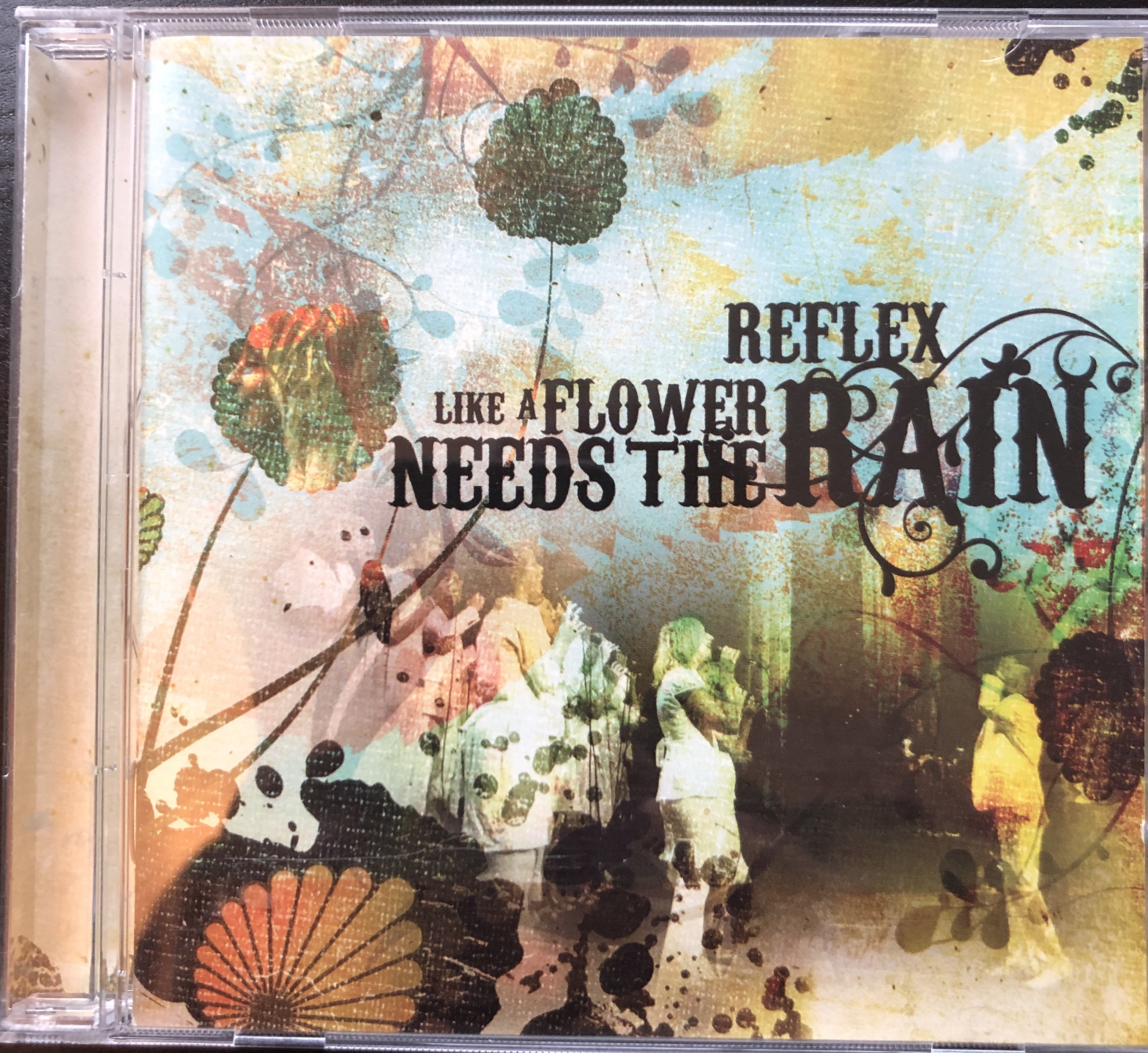 Albumcover til Reflex Like A Flower Needs The Rain